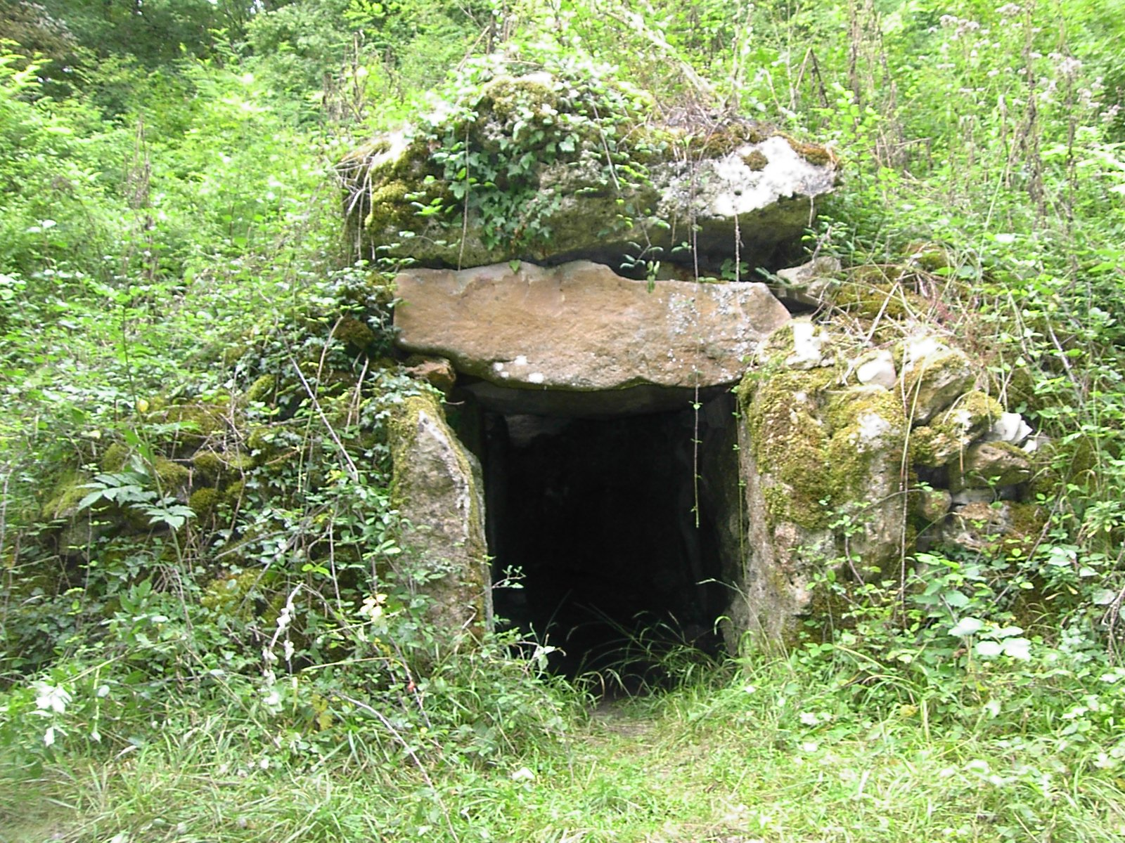 Sous son tumulus, l'allée couverte du Reclus, à Bannay ( 51 ), est un monument mégalithique, qui présente la particularité d'avoir été édifié dans le voisinage immédiat des hypogées ( grottes funéraires creusées dans la craie ) qui sont spécifiques de la civilisation néolithique de la Marne. .